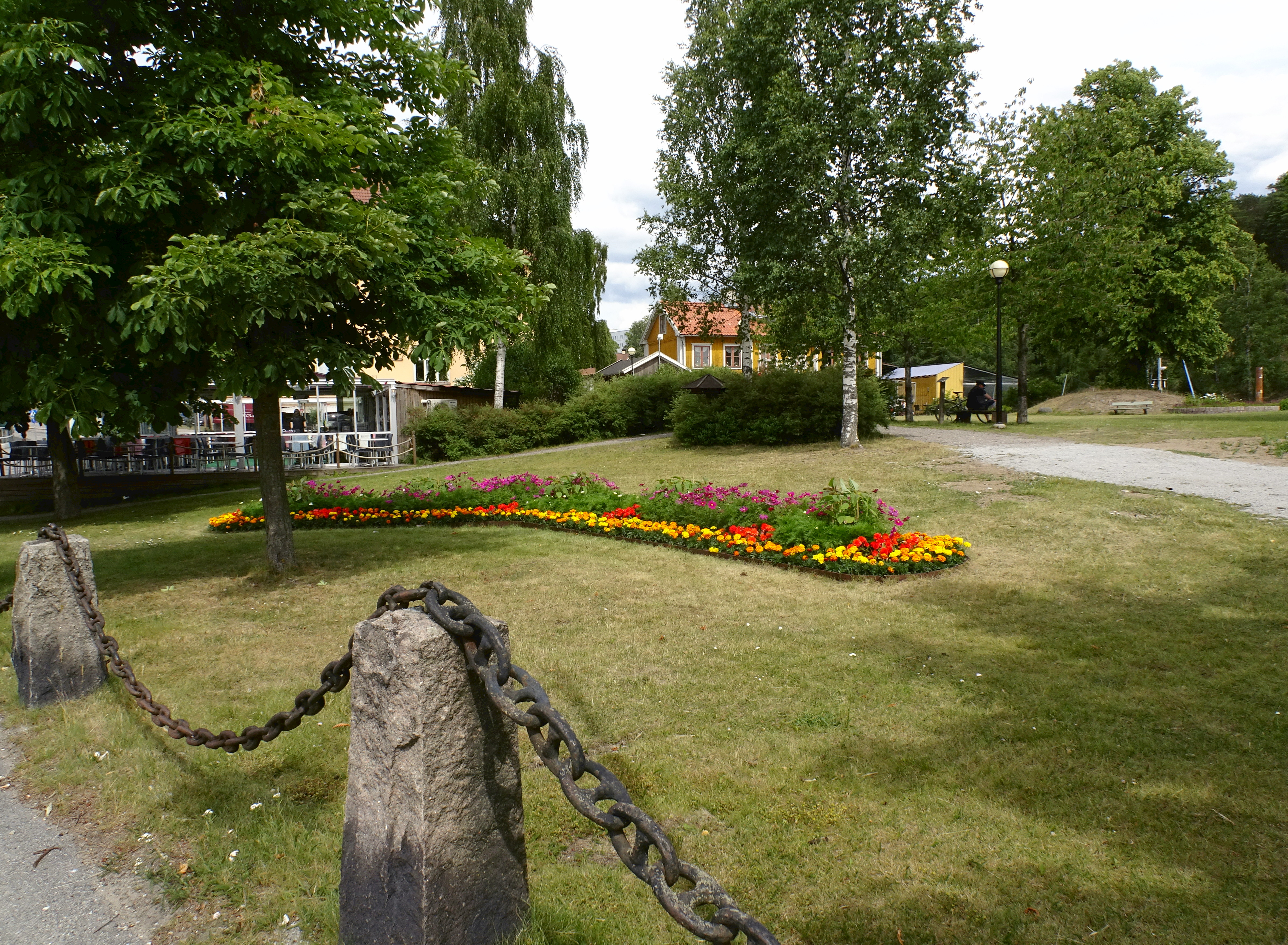 Vänortsparken